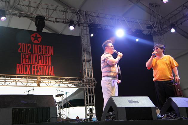 2012 펜타포트 락 페스티벌